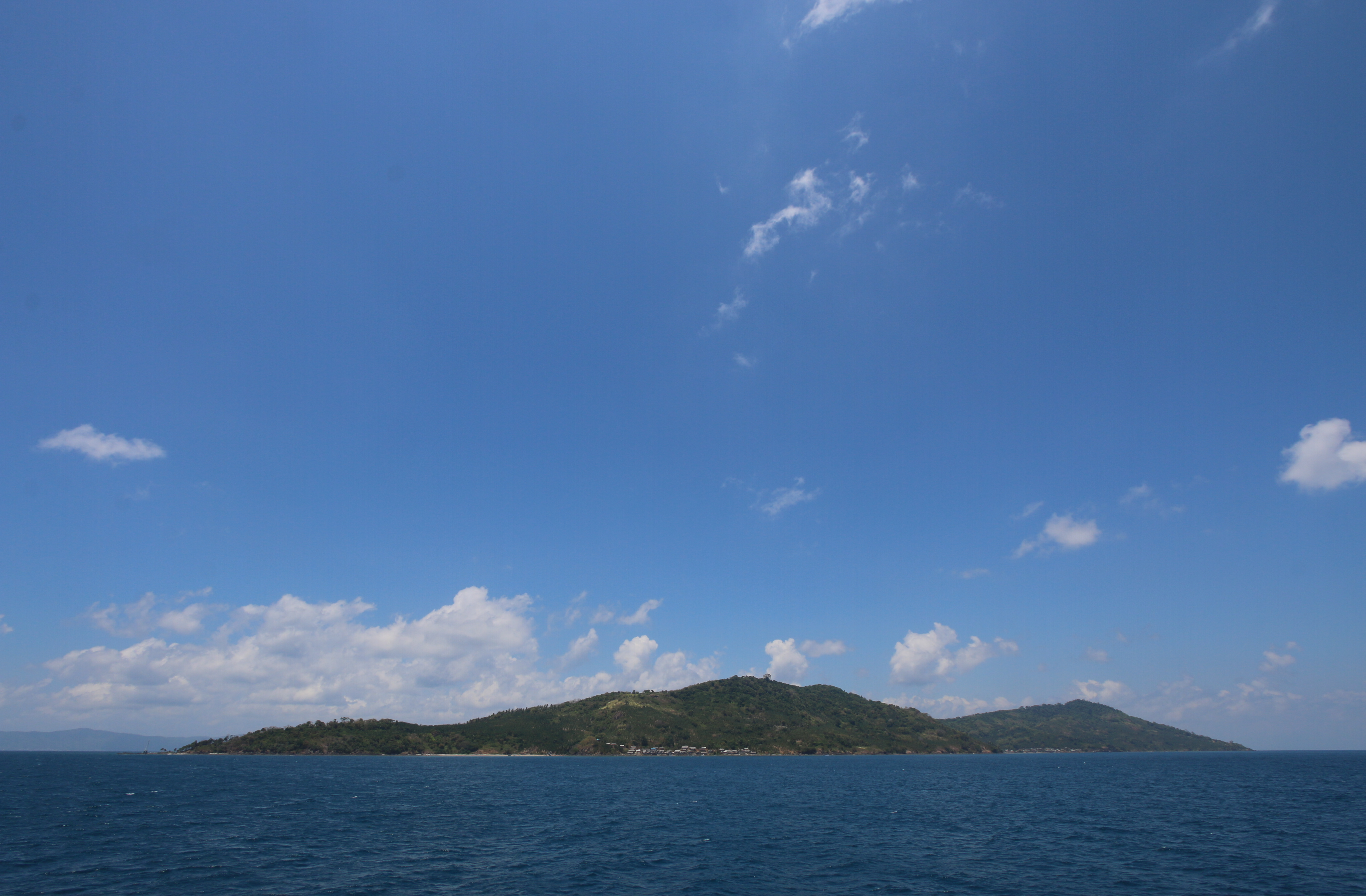 Penampakkan Pulau Maradapan dari sisi barat